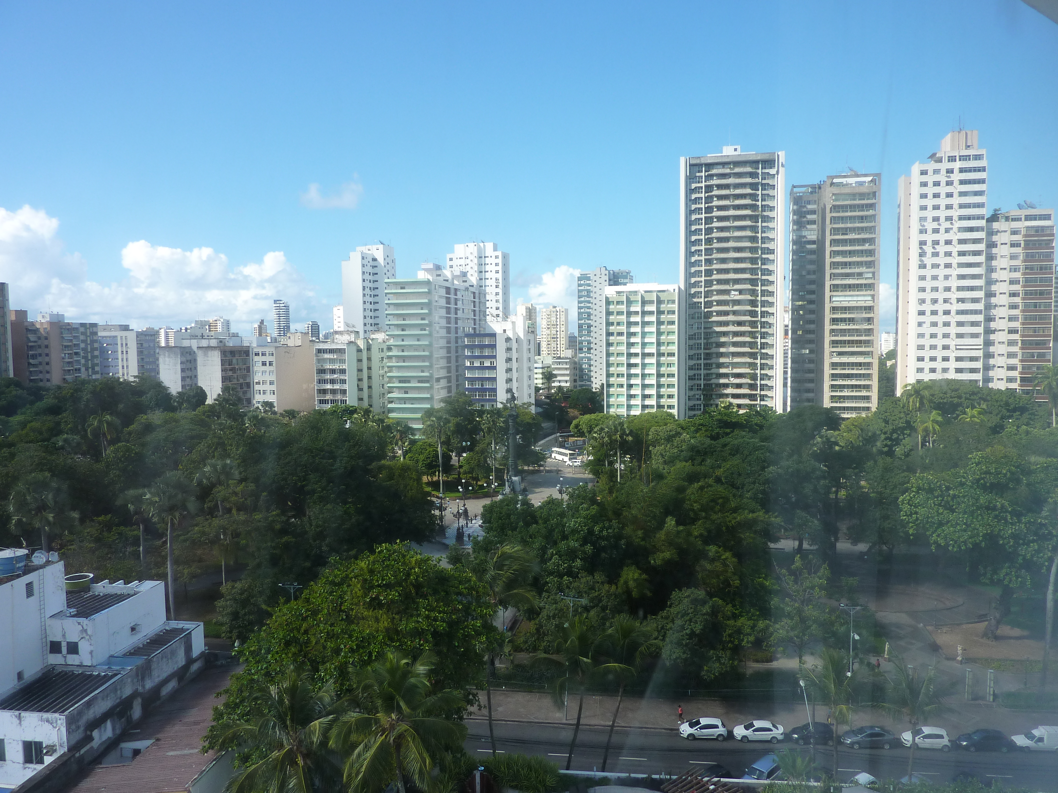 Sao Paulo, Porto Alegre, Salvador and Belo Horizonte, March 2014